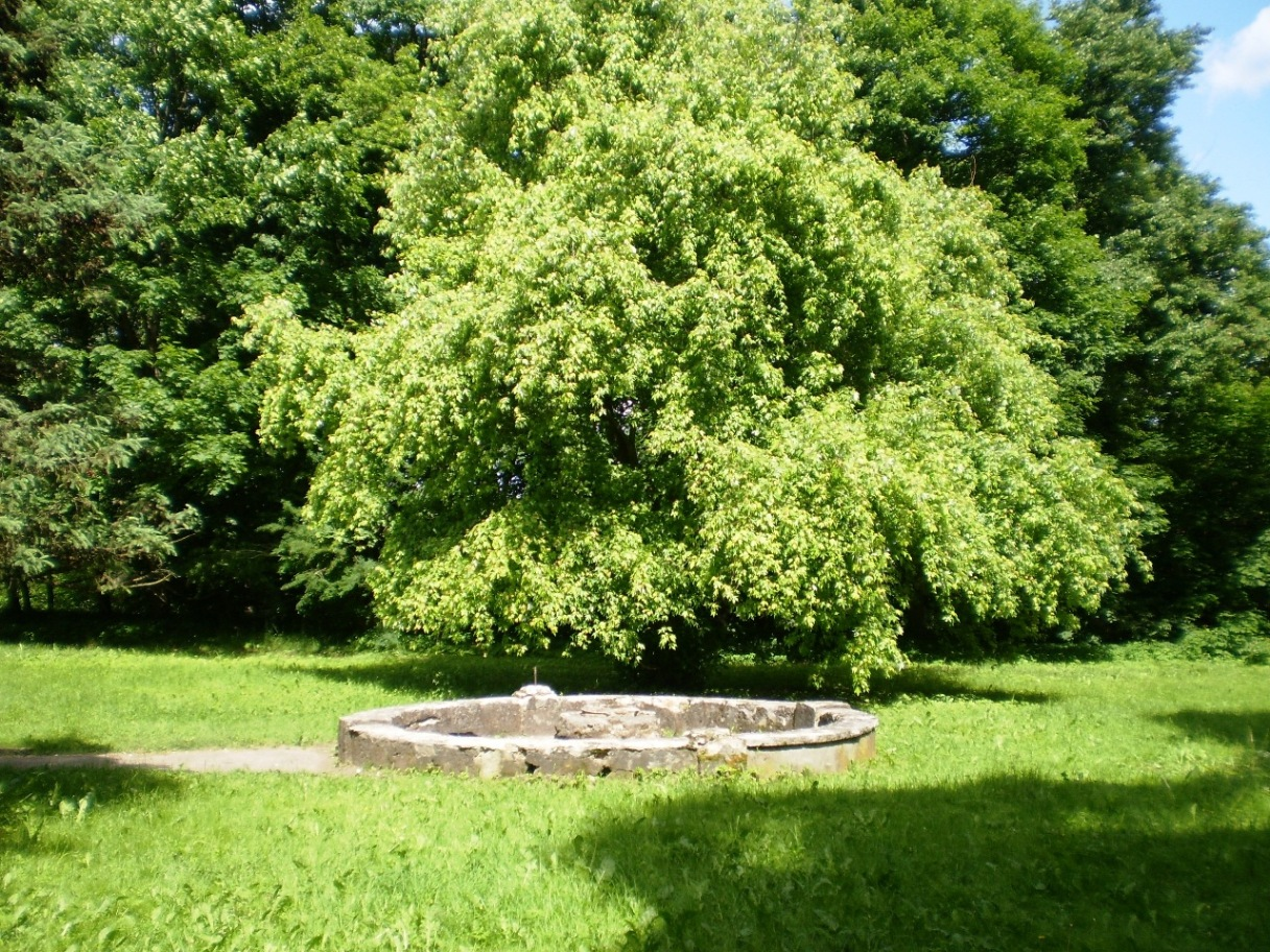 Buvęs fontanas, Lančiūnavos dvaras, Kėdainių raj.